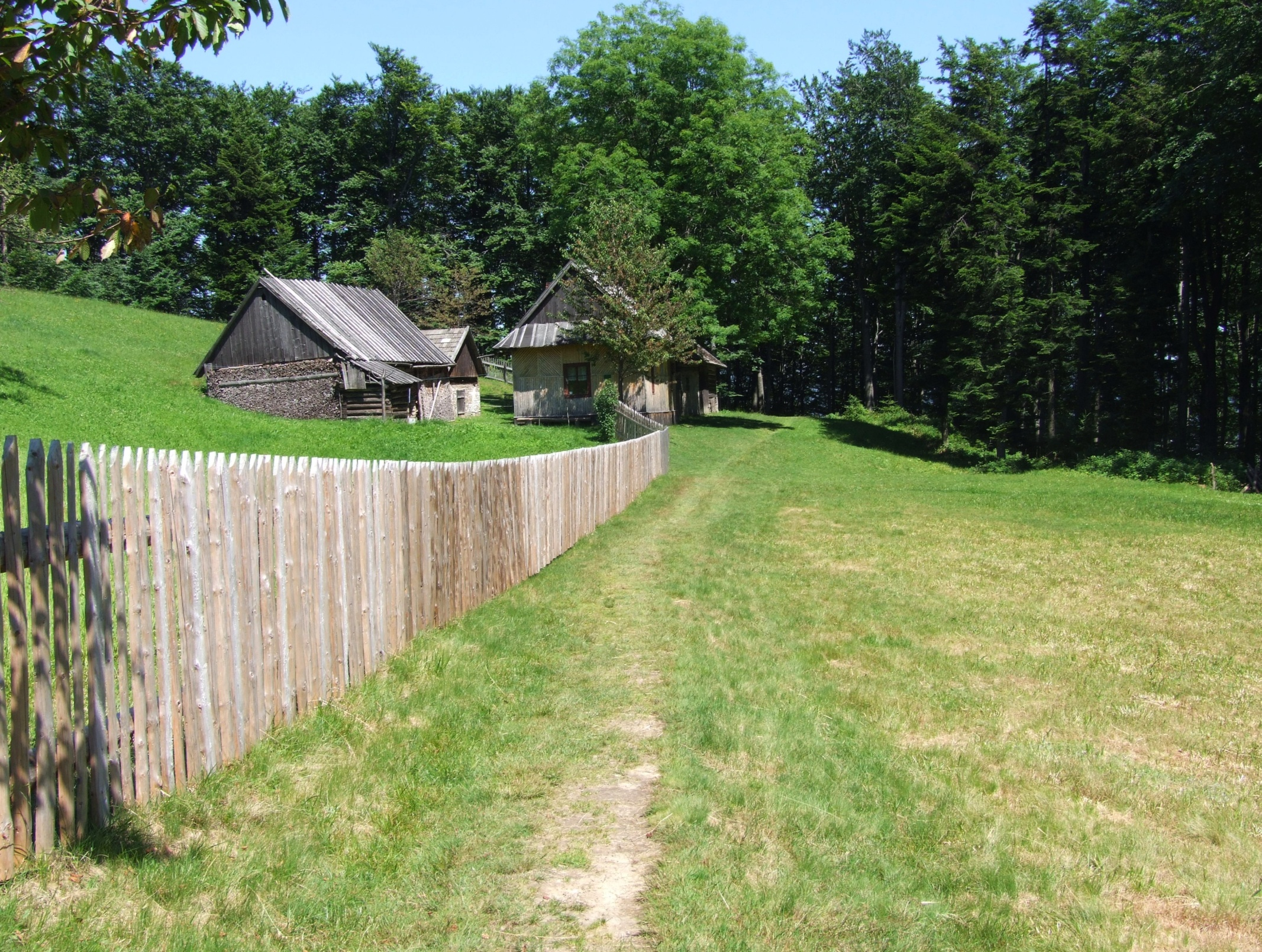 Polana Niemcowa w Beskidzie Sądeckim i jedyne gospodarstwo rolne jeszcze działające w 2010